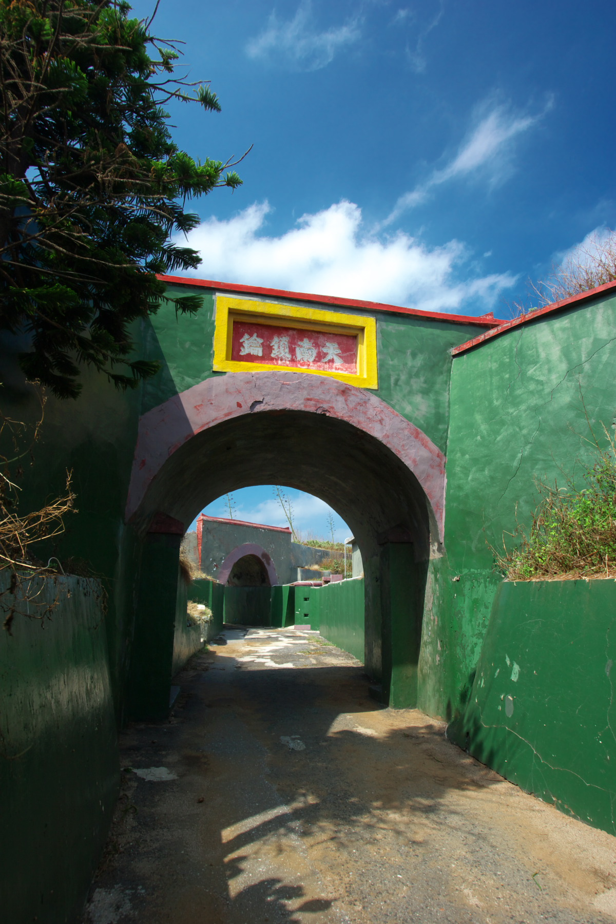 馬公金龜頭砲臺。